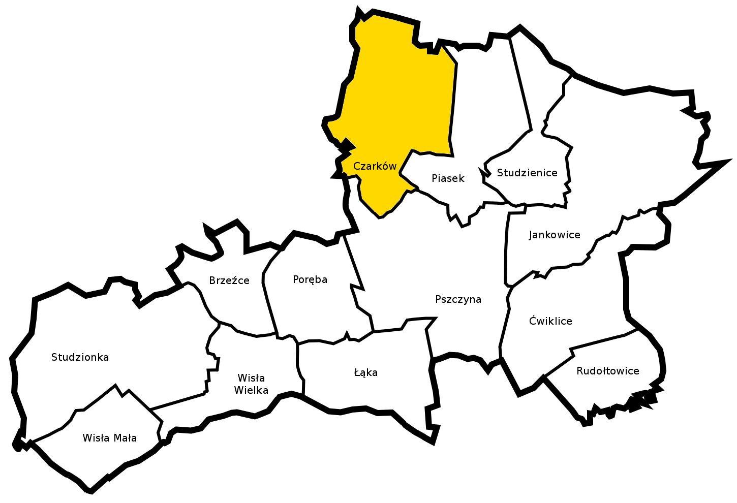 Gmina Pszczyna - sołectwo Czarków